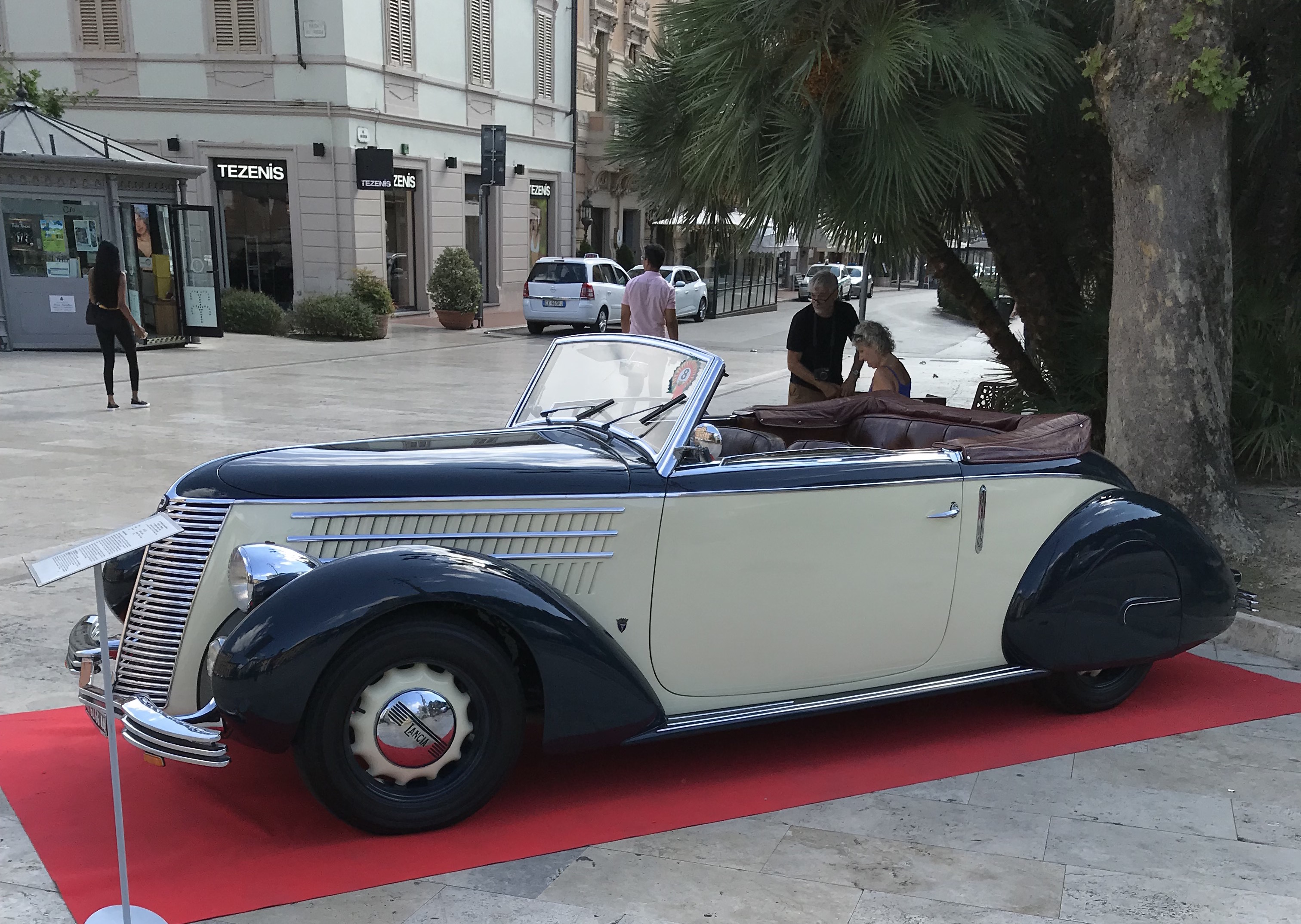 1938 Lancia Aprilia cabriolet